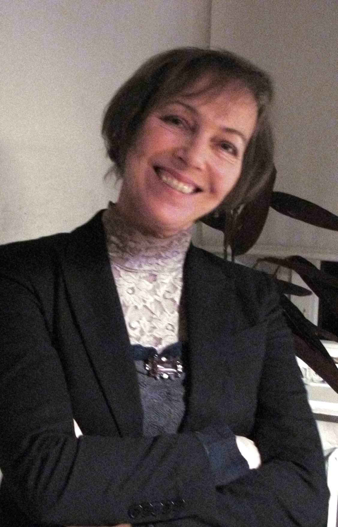 Joanna Piech-Kalarus, grafik, Katowice